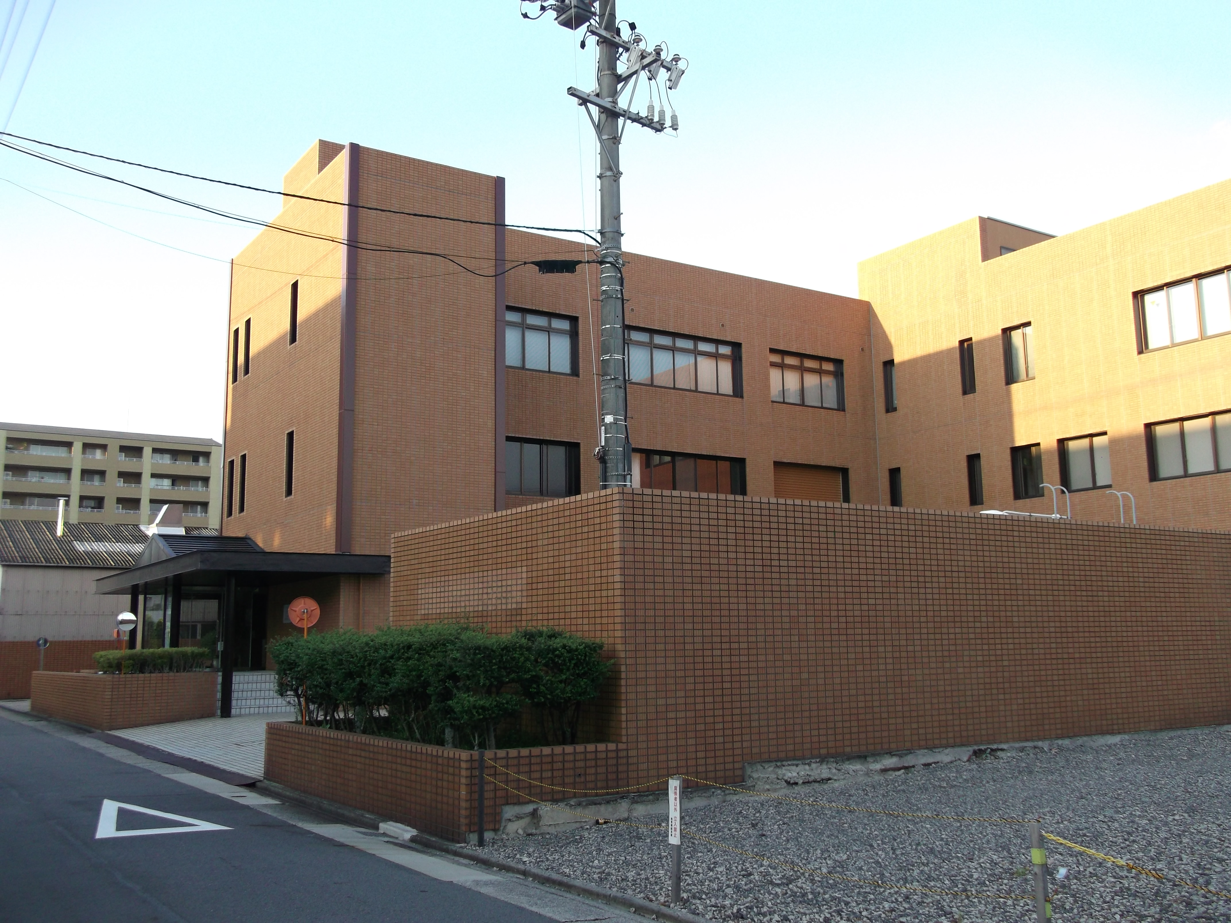 名古屋市守山区瀬古の青柳総本家本社を西側公道南側より撮影。